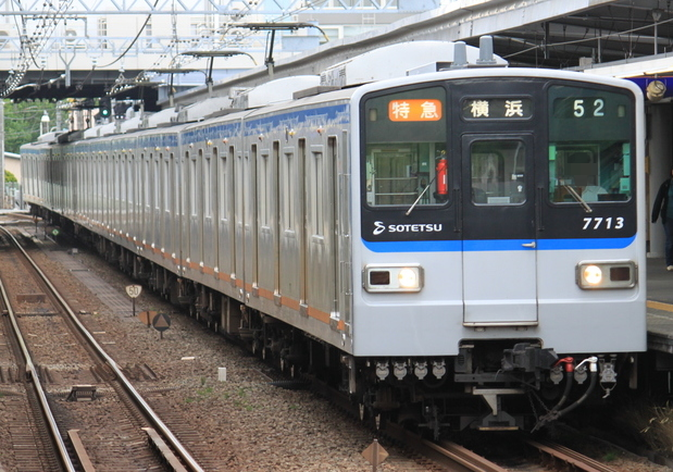 new7000